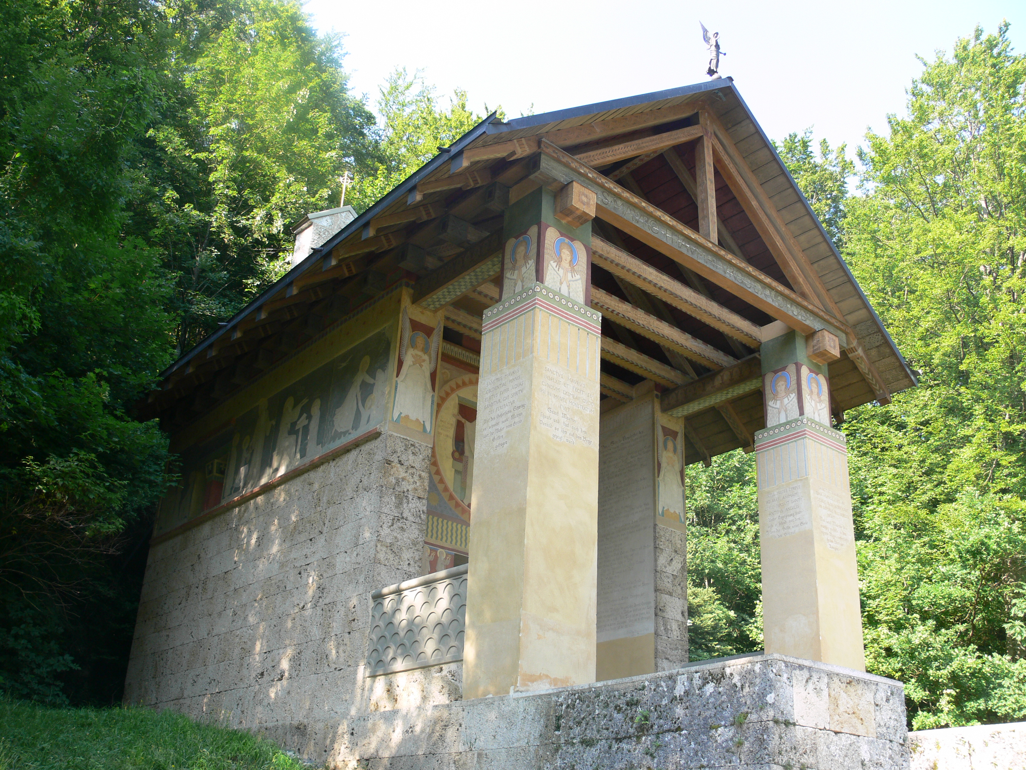 St.-Maurus-Kapelle, Beuron (Donautal), erbaut 1868–1870, Architekt: Desiderius Lenz, Maler: Gabriel Wüger